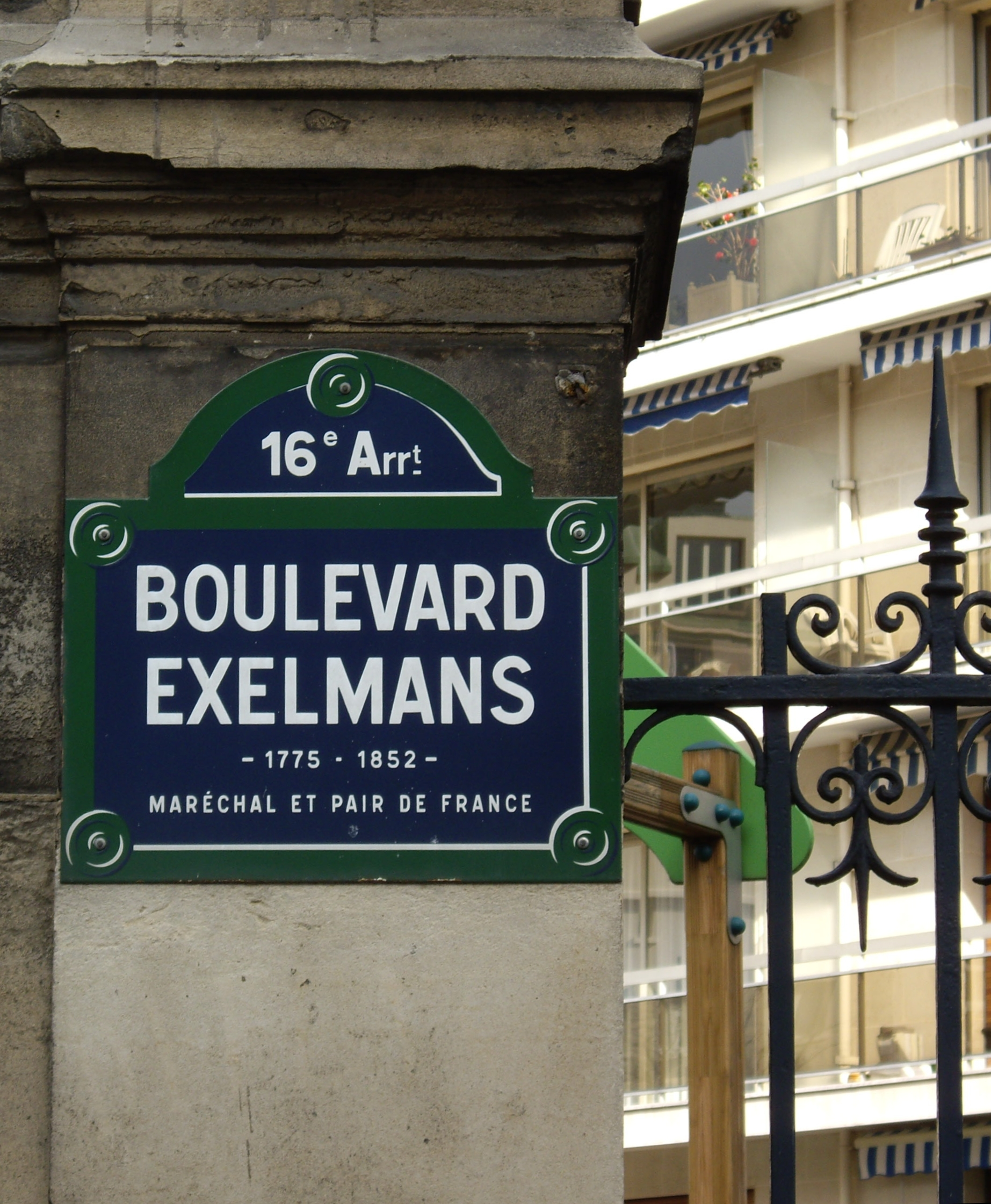 Boulevard Exelmans, Paris 16e. « Excelmans, 1775-1862, maréchal et pair de France. »